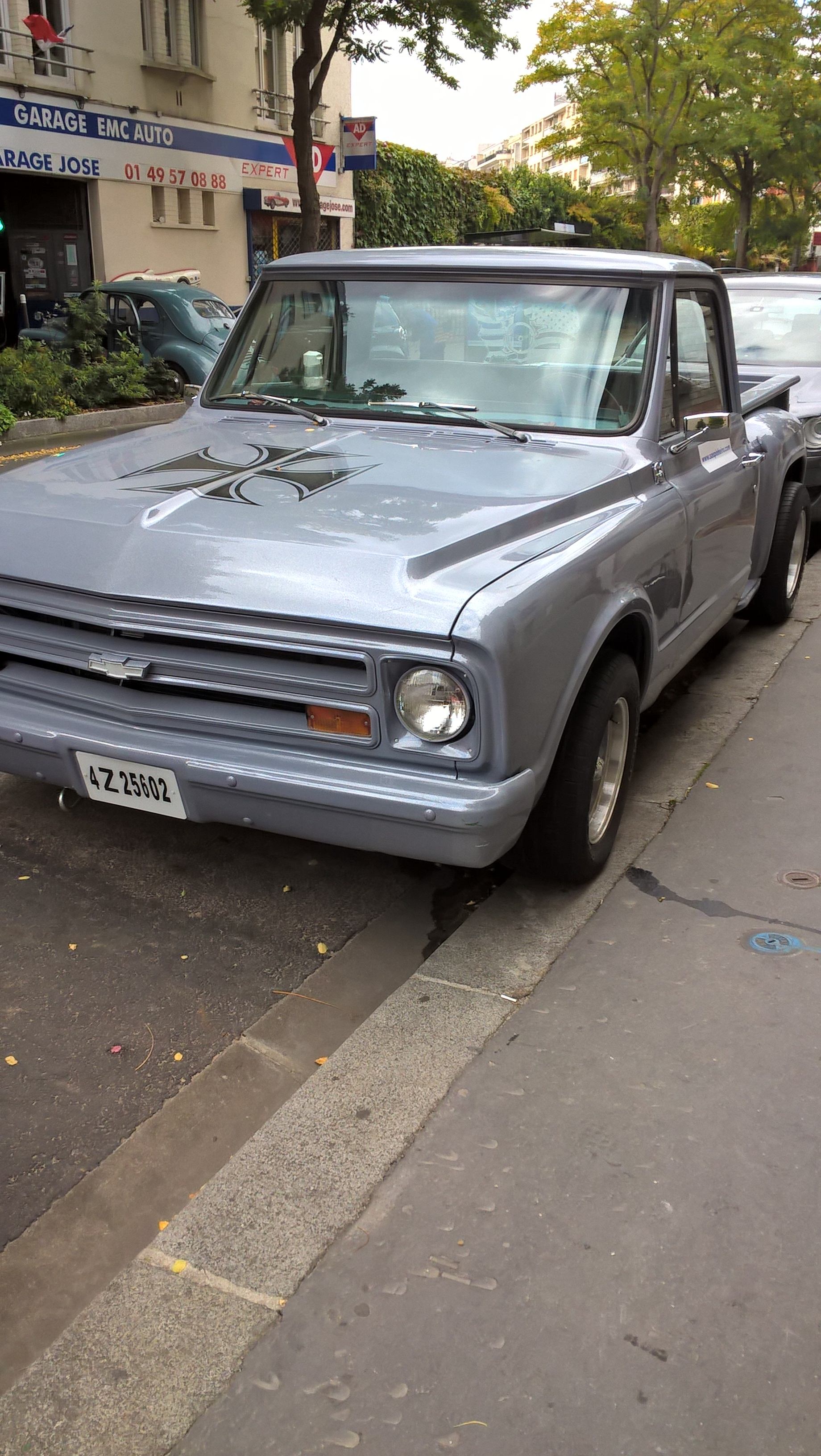 Dodge gris métallisée